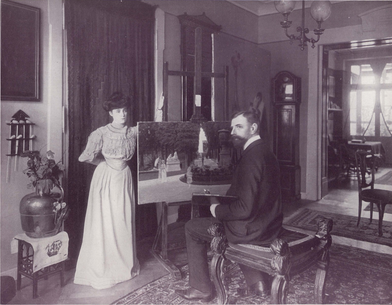 Der deutsche Maler Heinrich Lessing (1856-1930) mit seiner Gemahlin, aufgenommen 1905/1906.